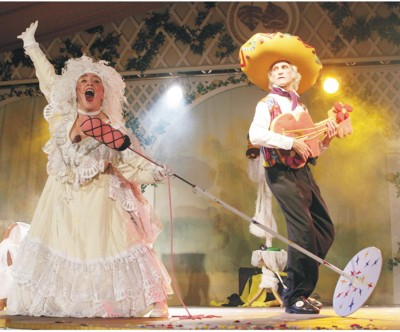 Konkurs Teatrów Ogródkowych - Ogrody Frascatii 2006: Teatr Nicoli